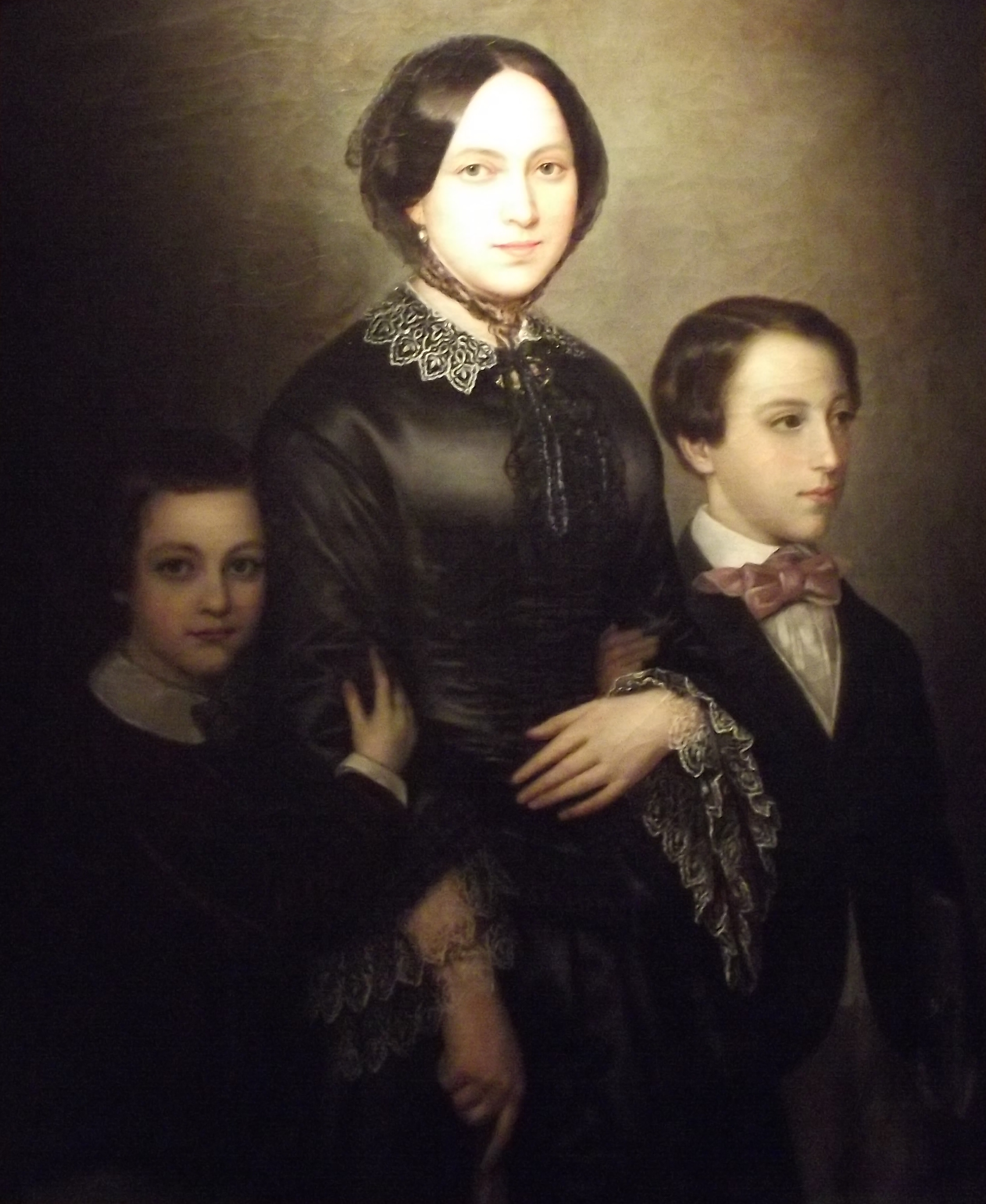 La obra representa a la esposa y a los hijos del pintor español José Balaca.